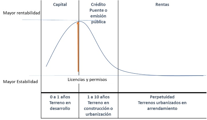 Gráfica que describe las etapas de un Desarrollo Inmobiliario en México